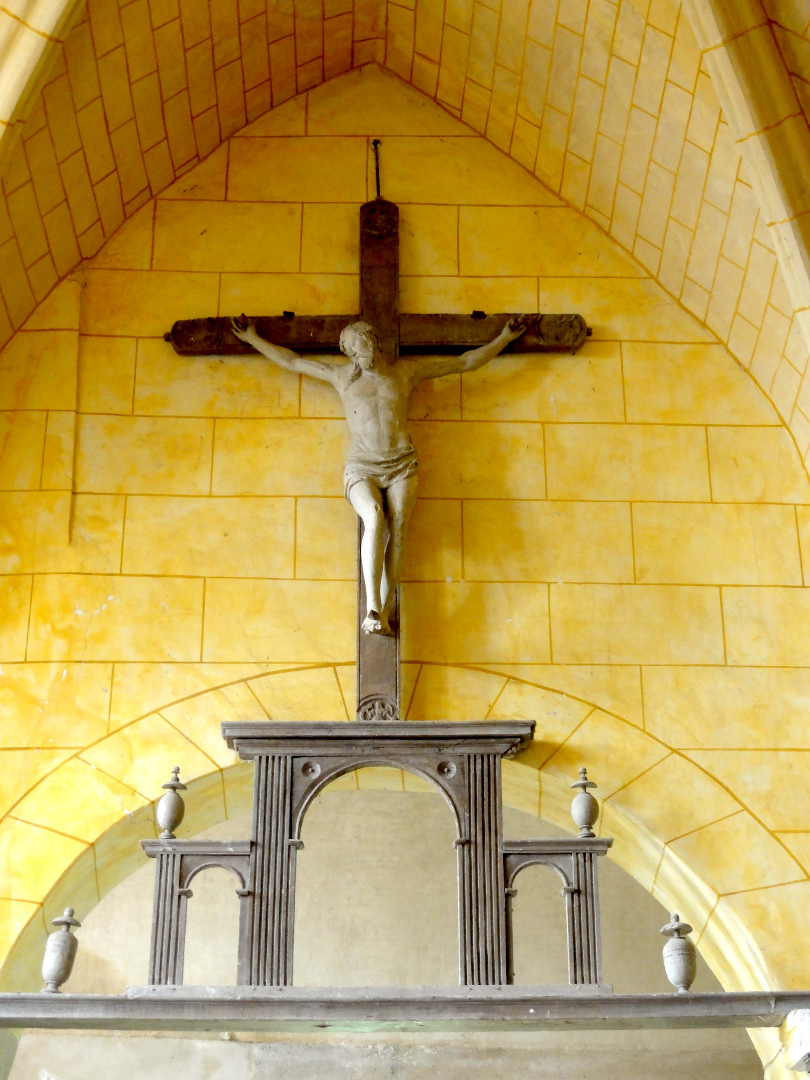 Nef, Christ en croix d'une poutre de gloire.